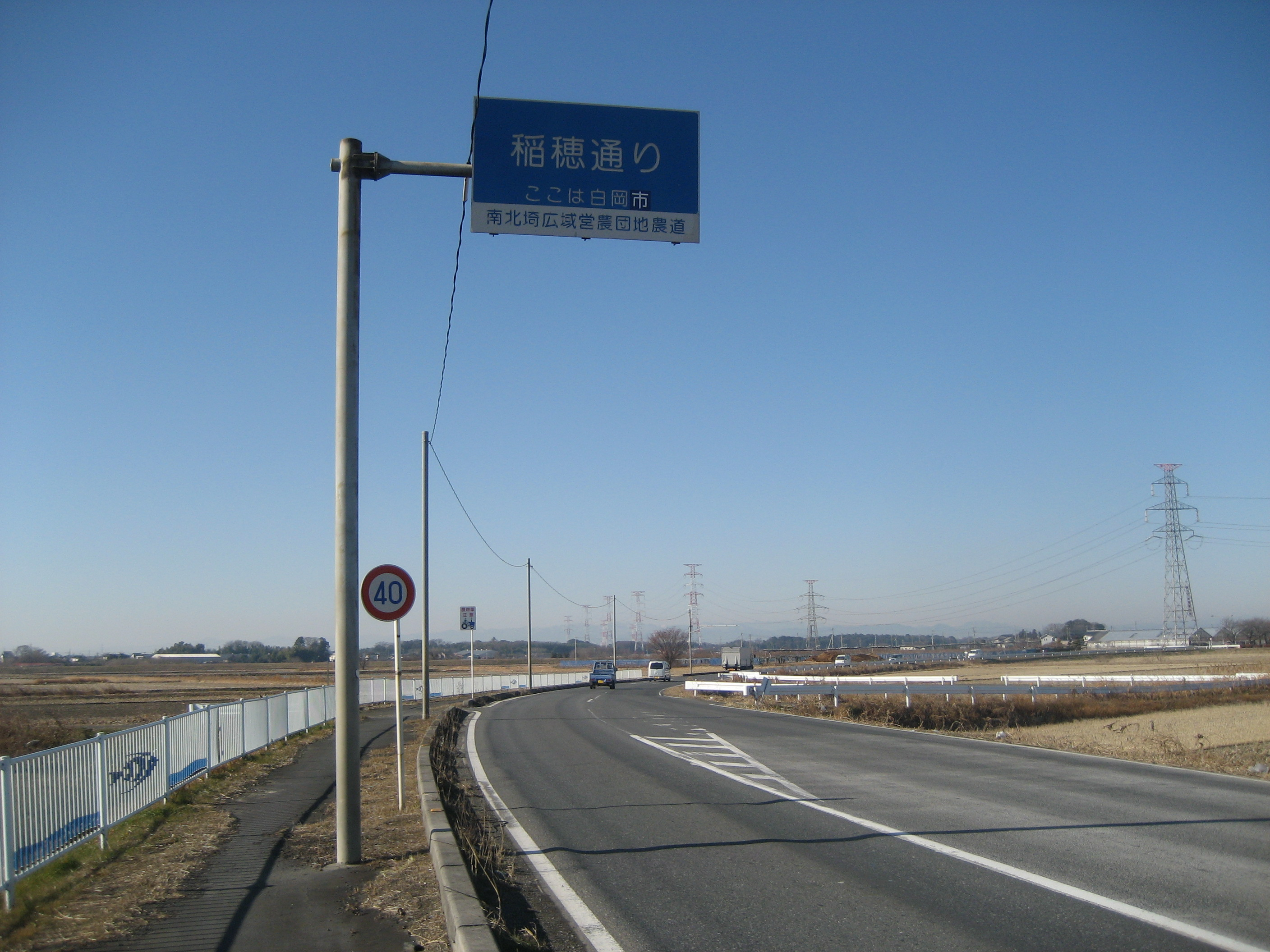 埼玉県にある南北埼広域農道（白岡市柴山沼交差点西側付近）